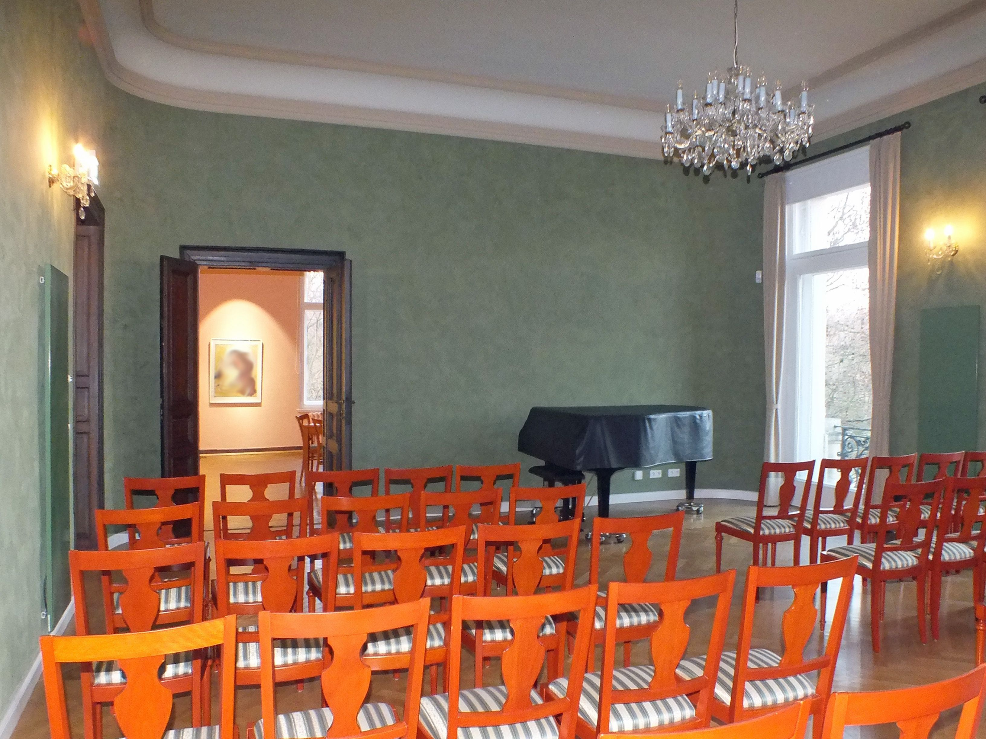 Weißes Haus Markkleeberg, Parksalon im ersten Stock mit Durchblick zum Rosenzimmer